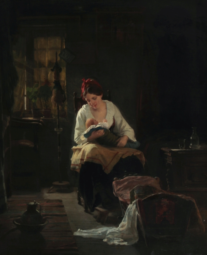 Mutter mit Kleinkind in der Stube, signiert., Ortsbezeichnung Düsseldorf, Öl auf Leinwand, auf Hartfaser, 90 x 75 cm